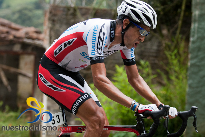 Hernán Buenahora, Vuelta a Antioquia 2011 en el equipo GW Shimano